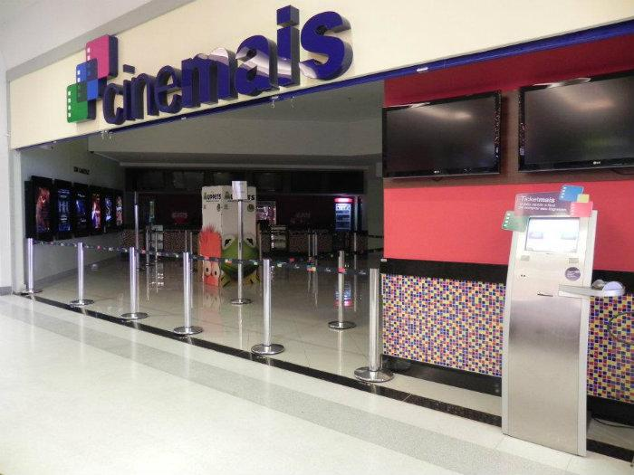 Vista lateral da fachada do Cinemais de Resende, RJ